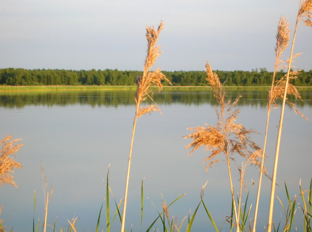 Dolina Środkowej Noteci i Kanału Bydgoskiego - Staw Kardynalski